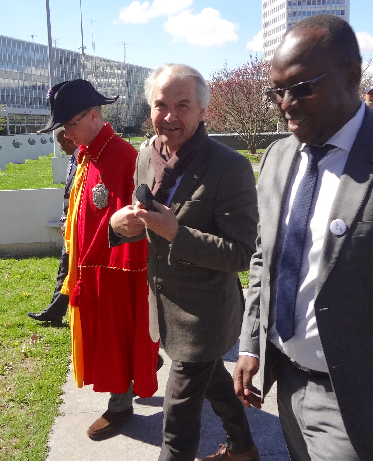 Rémy Pagani et Cesar Murangira lors du « Dévoilement du mémorial aux victimes du génocide perpétré contre les Tutsi au Rwanda en 1994 », 8 avril 2019 à la place des Nations à Genève. Ont pris la parole : Rémy Pagani (conseiller administratif de la Ville de Genève), Cesar Murangira (président de Ibuka Mémoire et Justice section suisse) et François Xavier Ngarambe (ambassadeur du Rwanda en Suisse).